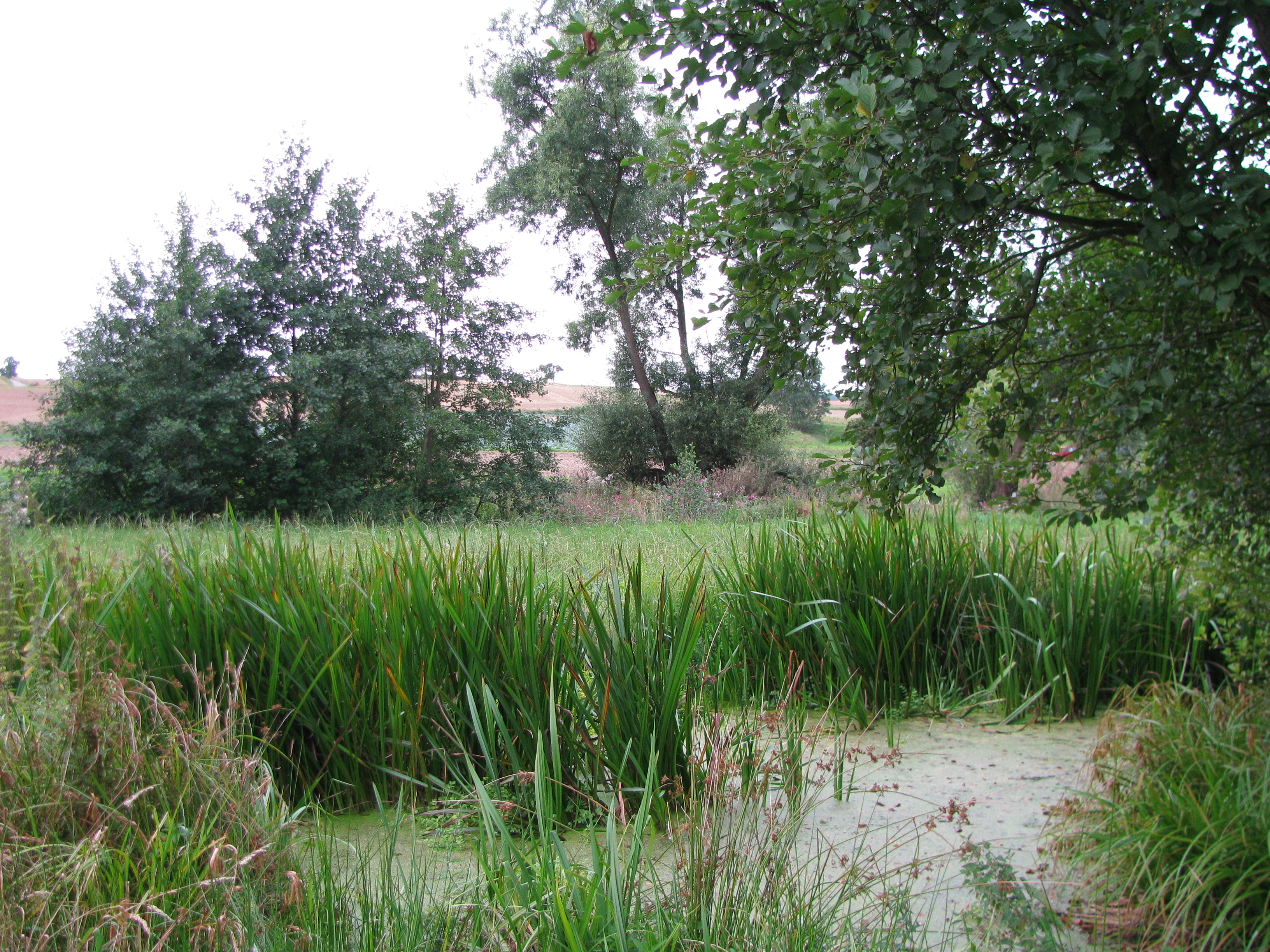 Blick über den Kirschenborn und über die Ems